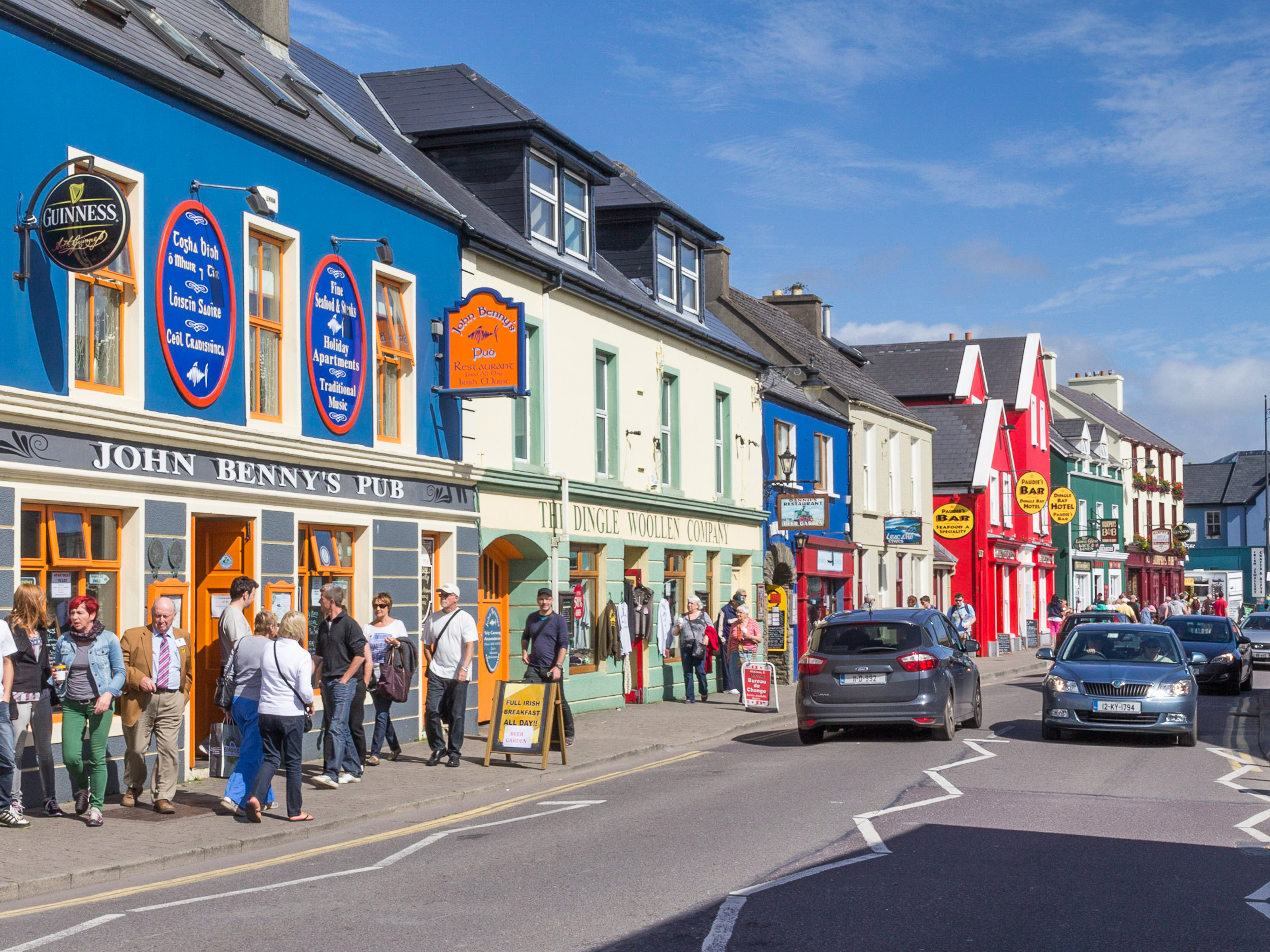 Dingle Strand Street